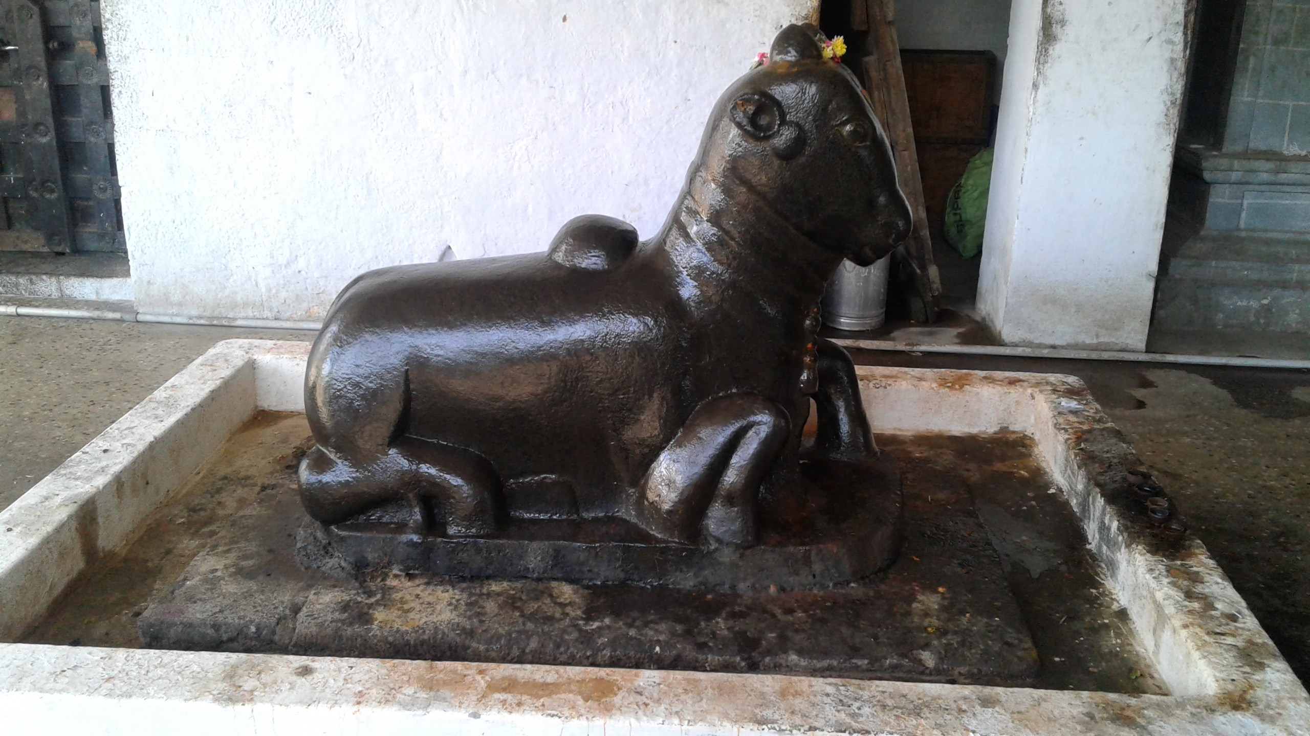 கருப்பத்தூர் சிம்மபுரீசுவரர் கோயிலில் உள்ள சிவாலய நந்தி.